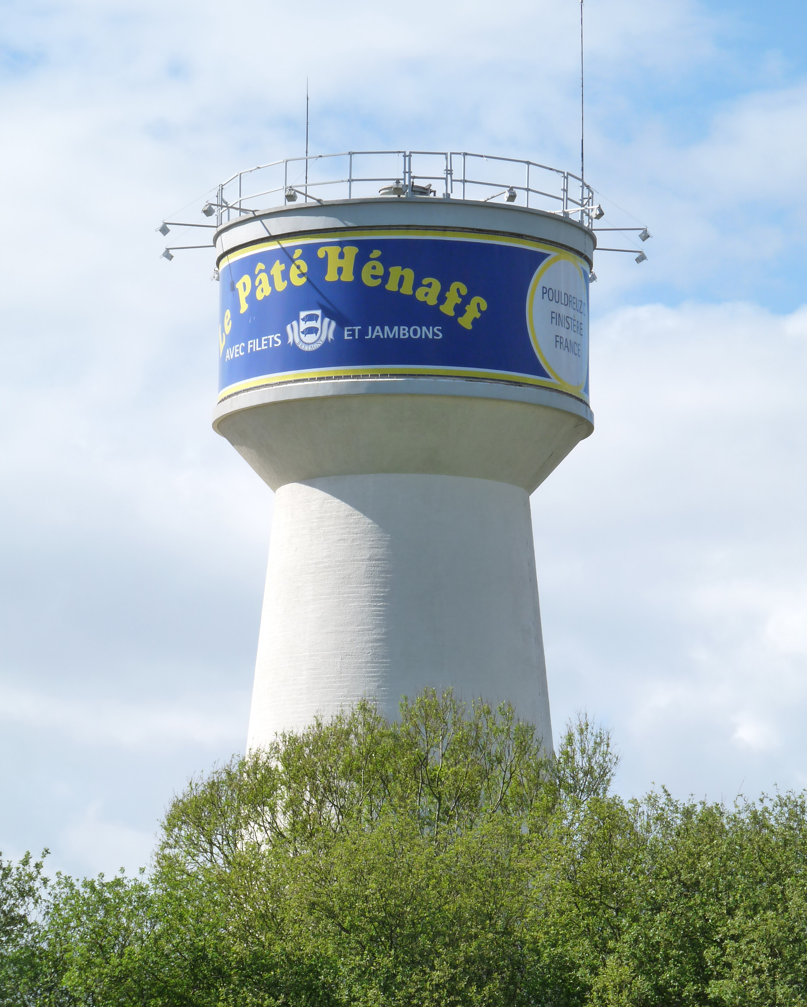 Le château d'eau de la société Hénaff aux couleurs de la boîte de pâté de la marque à Pouldreuzic (Finistère).